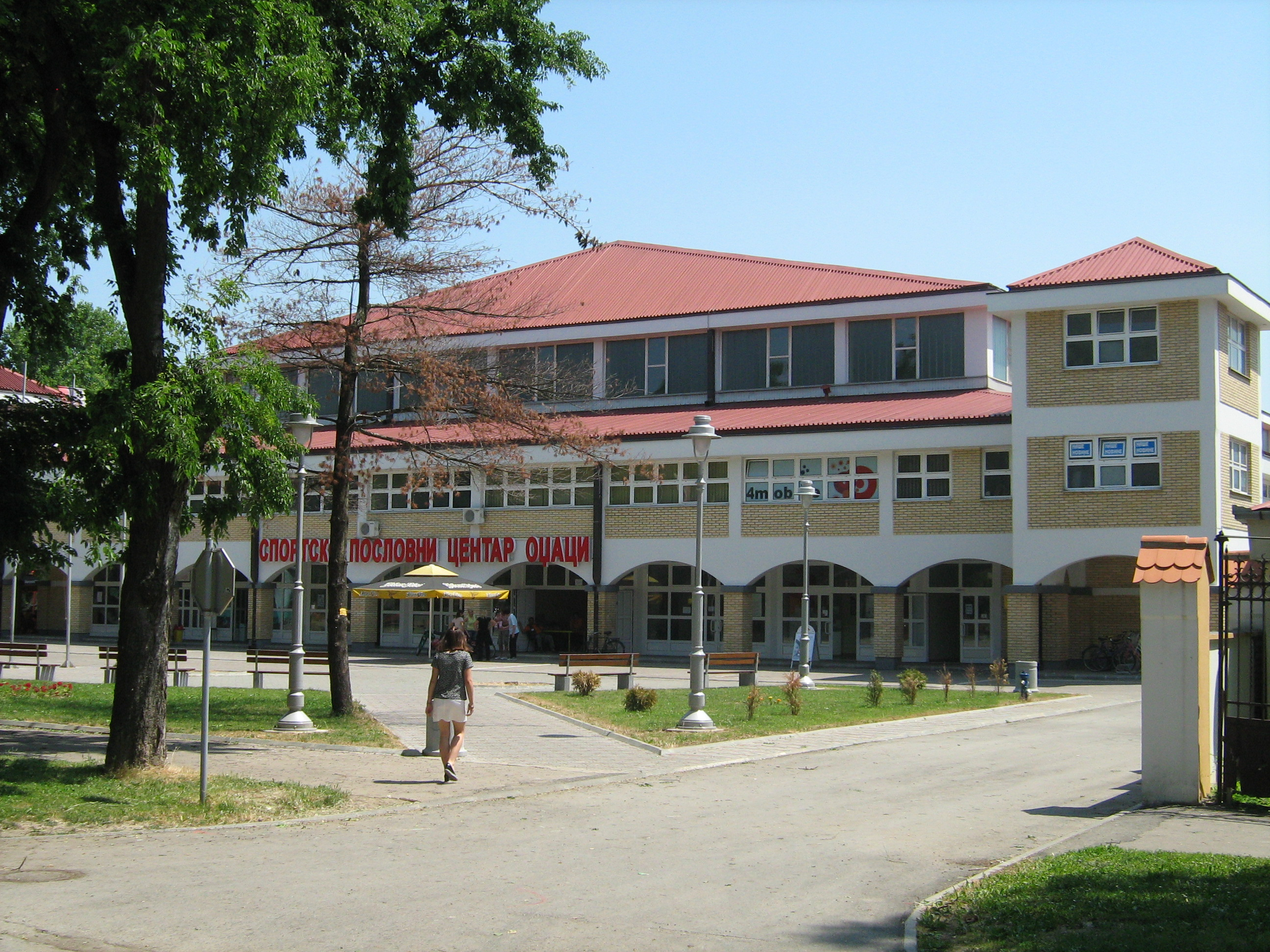 Sportsko poslovni centar Odzaci